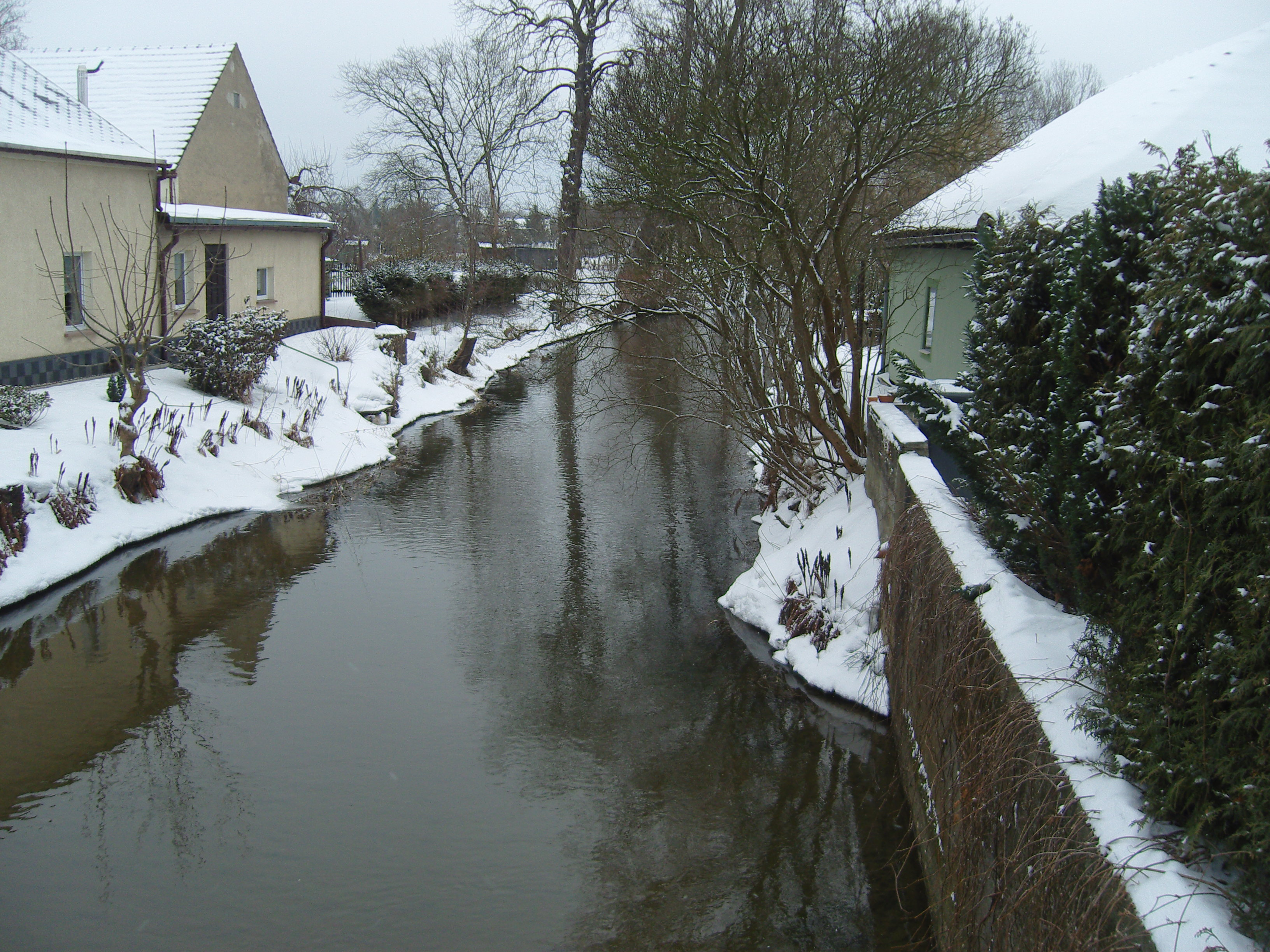 Die Pulsnitz in Ortrand - Grenze zwischen Burkersdorf in der Oberlausitz links im Bild und Ortrand im Schraden rechts im Bild